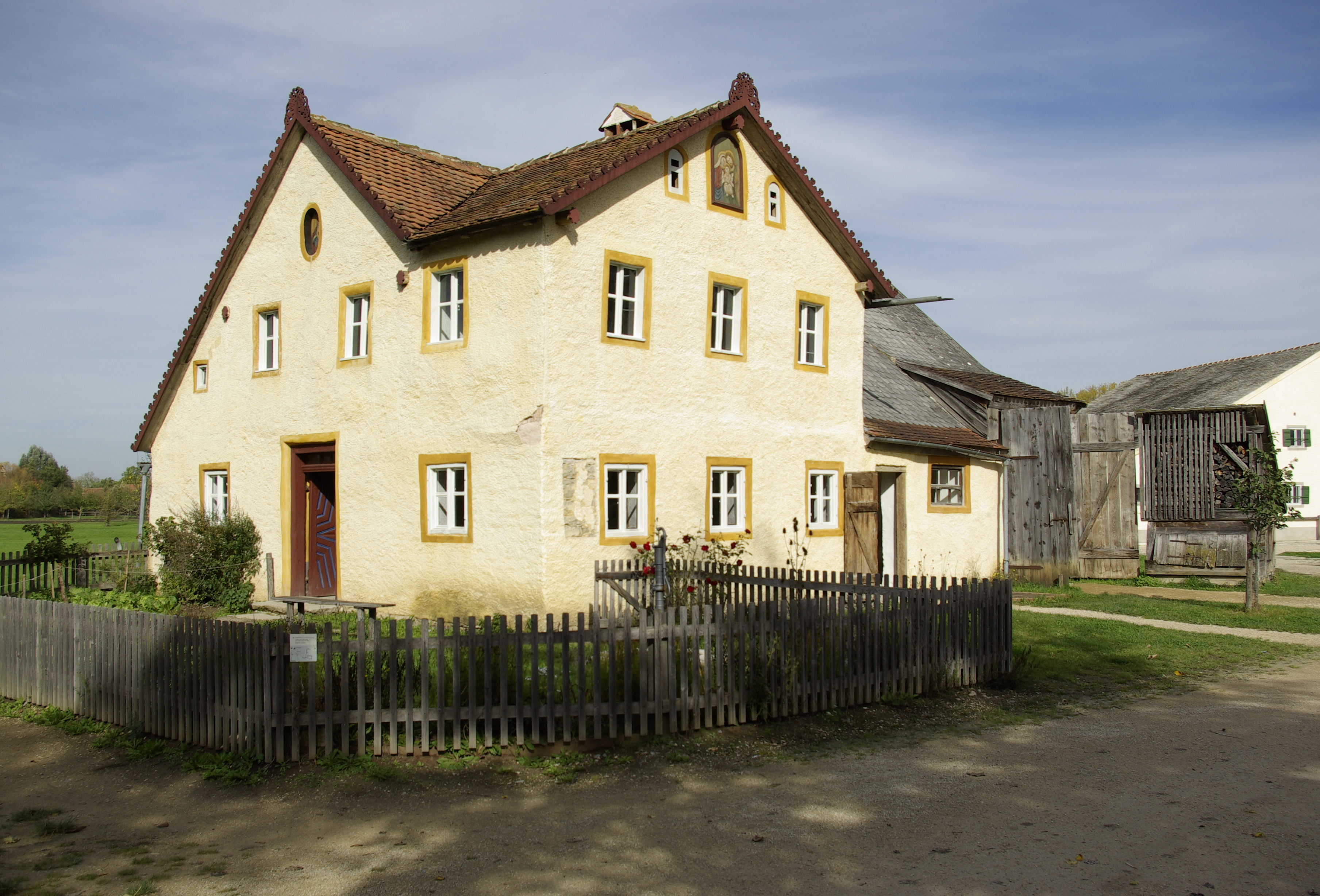 Fränkisches Freilandmuseum Bad Windsheim: Seldenhaus aus Obermässing.